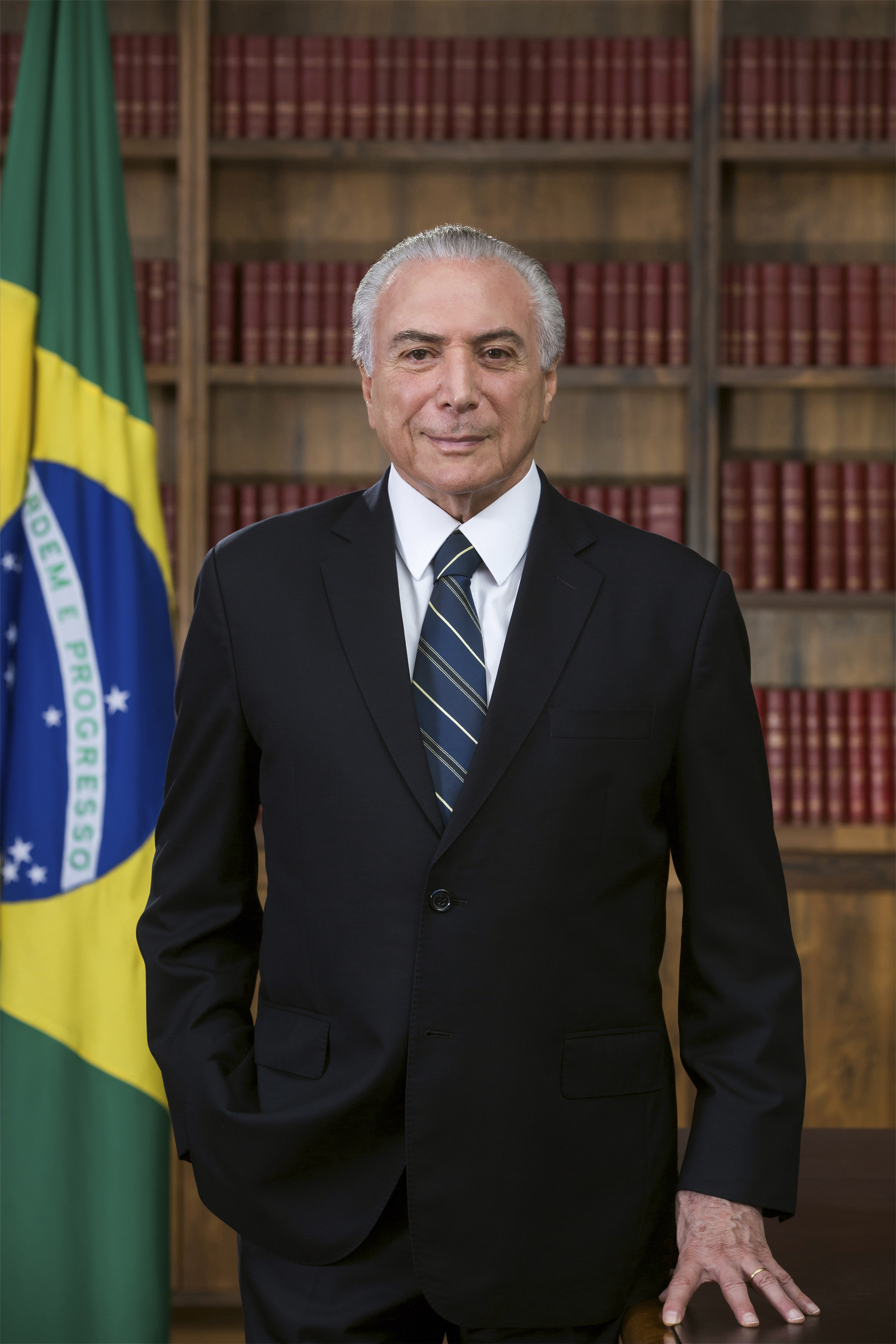 Foto oficial do Presidente Michel Temer